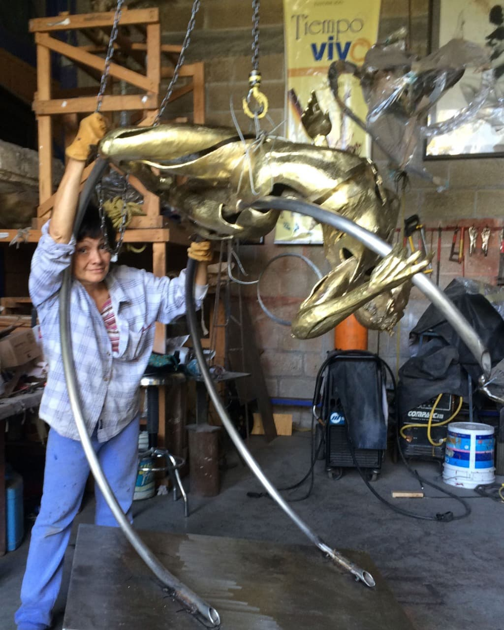 Miriam Perez trabajando en su taller